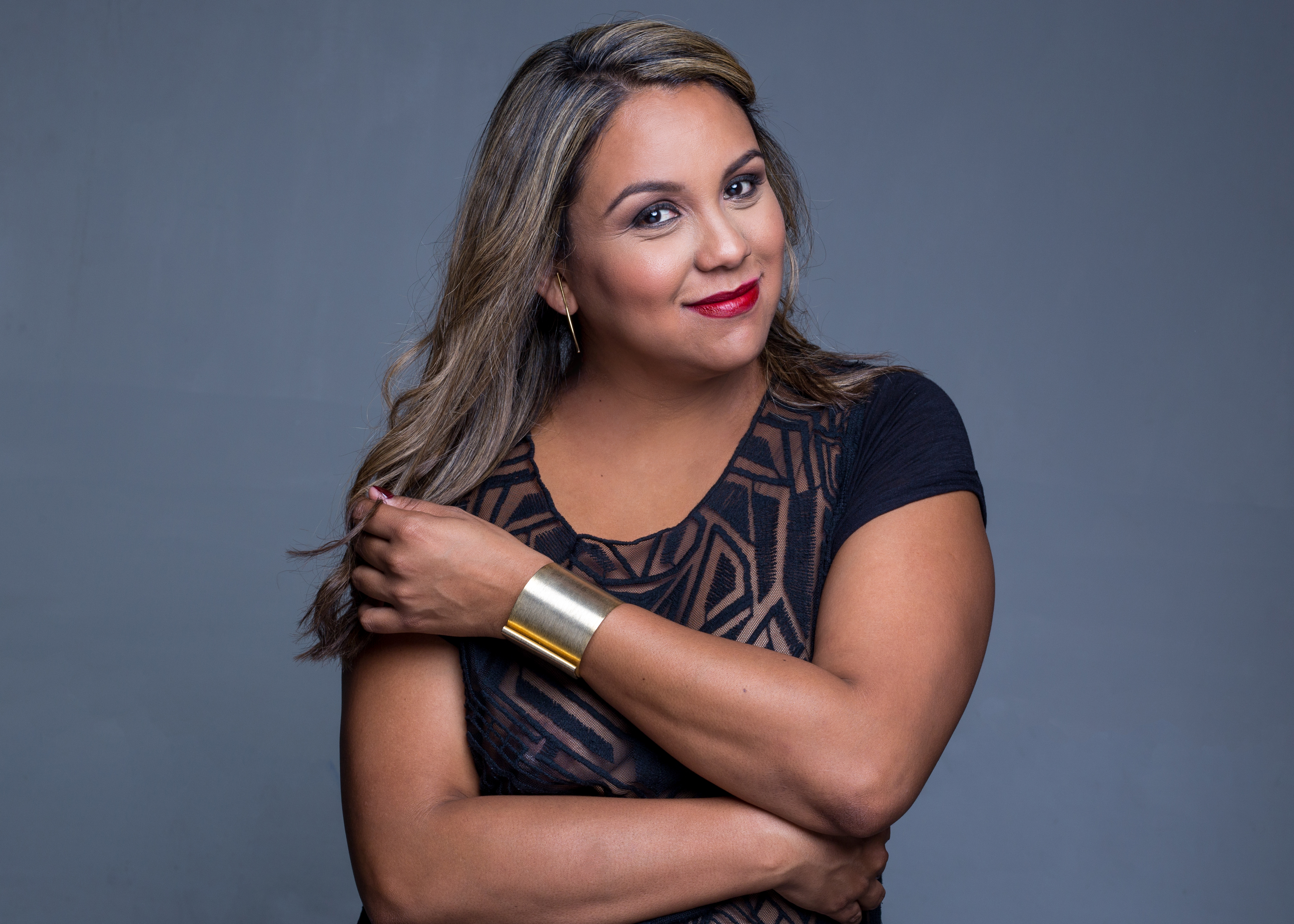 Este archivo es una foto de la actriz venezolana Lilver Tovar, tomada en el año 2017.